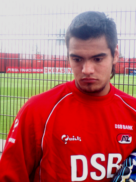 Foto van de doelman Sergio Romero op de eerste training van het seizoen 2007/2008 bij AZ Alkmaar.